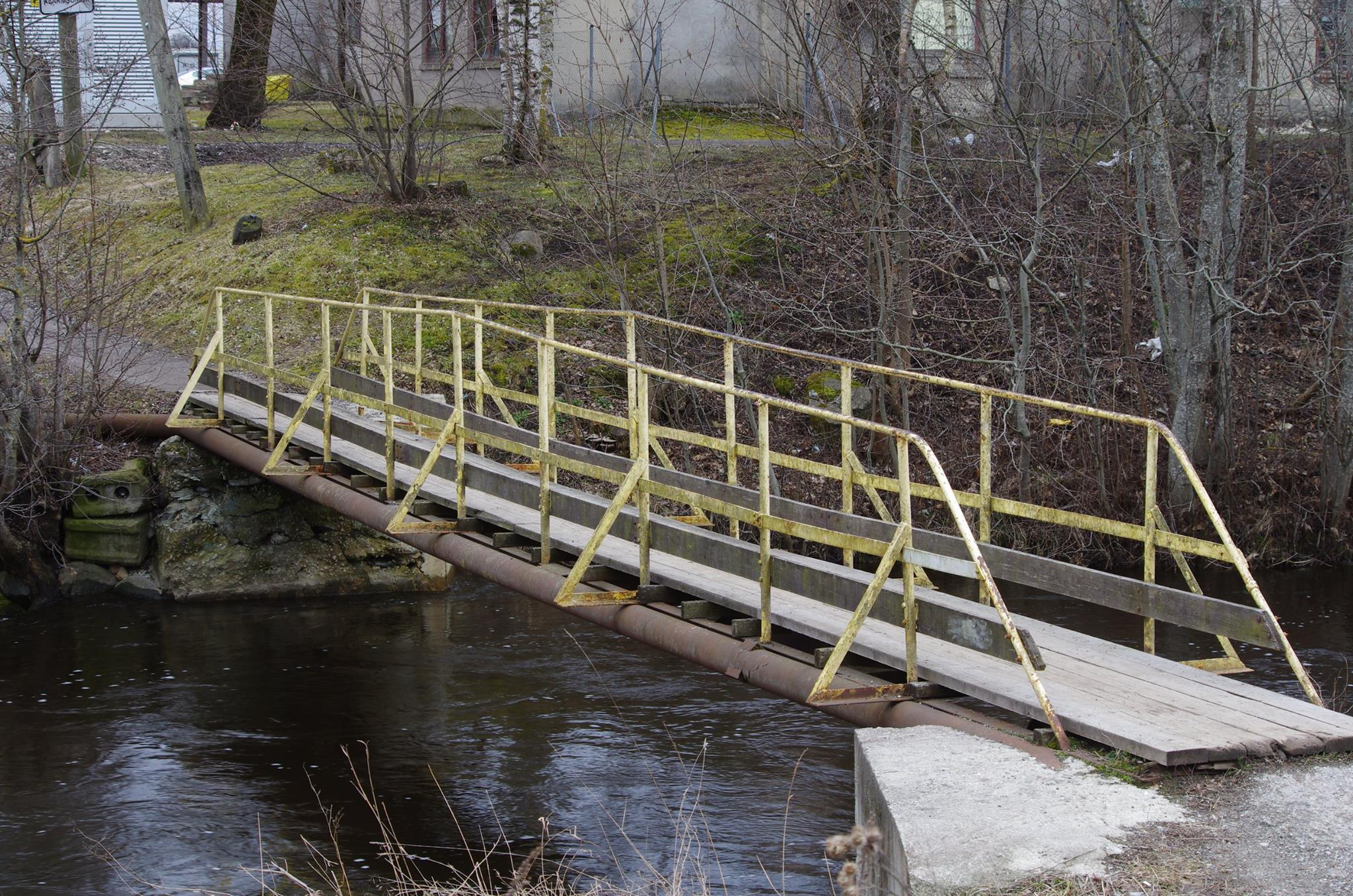 Keva jalakäijate sild. Rajatud 1970ndate esimeses pooles.